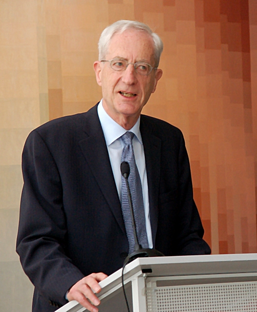 Jürgen Schmude, deutscher Politiker (SPD) und ehemaliger Bundesminister, bei der Entgegennahme des 2008 von der Union Evangelischer Kirchen (UEK) an ihn verliehenen Karl-Barth-Preises während der EKD-Synode vom April/Mai 2009 in Würzburg, Deutschland).